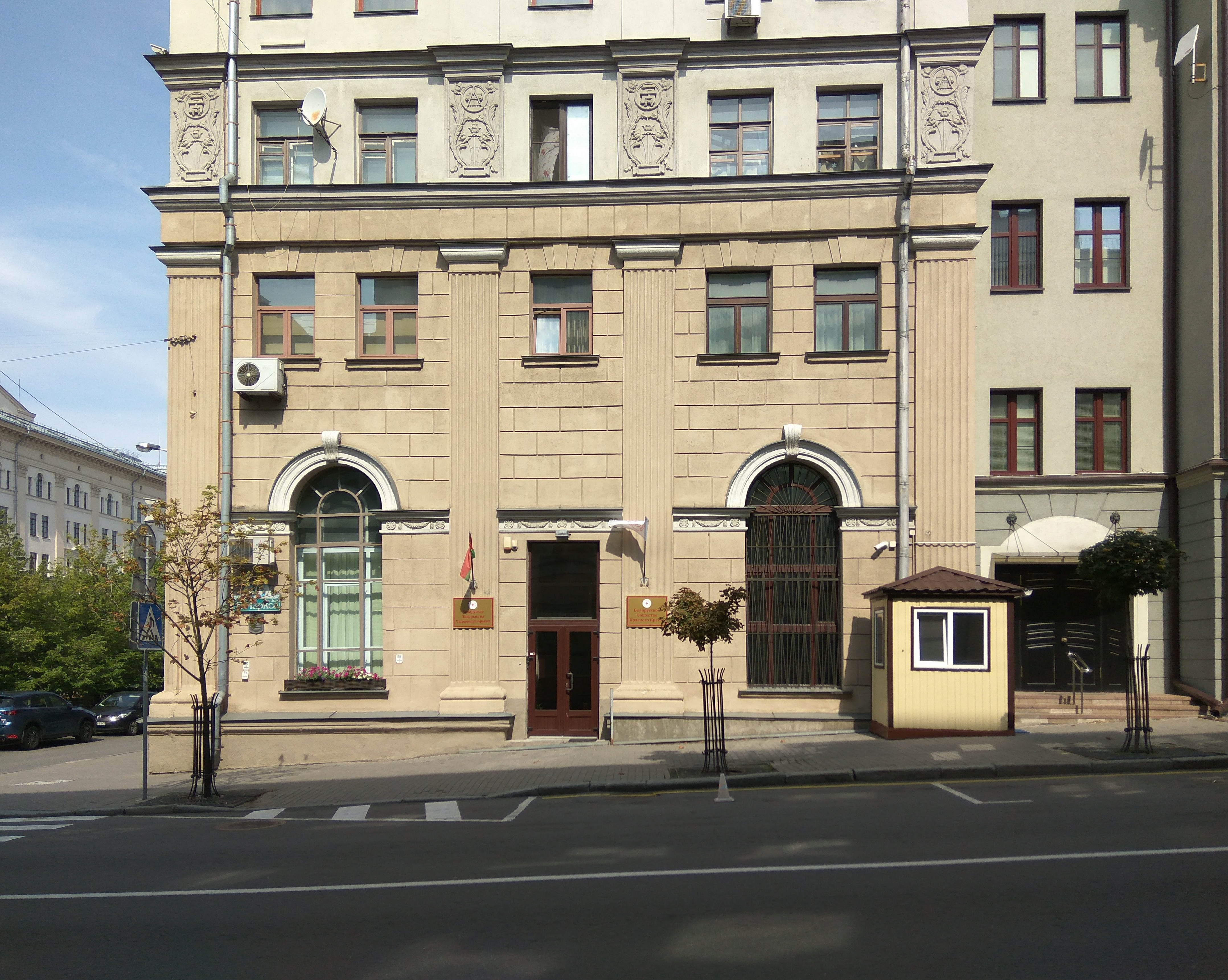 Мінск. Вуліца Карла Маркса. Беларускае таварыства Чырвонага Крыжа